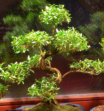 Serissa foetida als Bonsai, Stamm in Drachenform, ca. 16 Jahre alt.